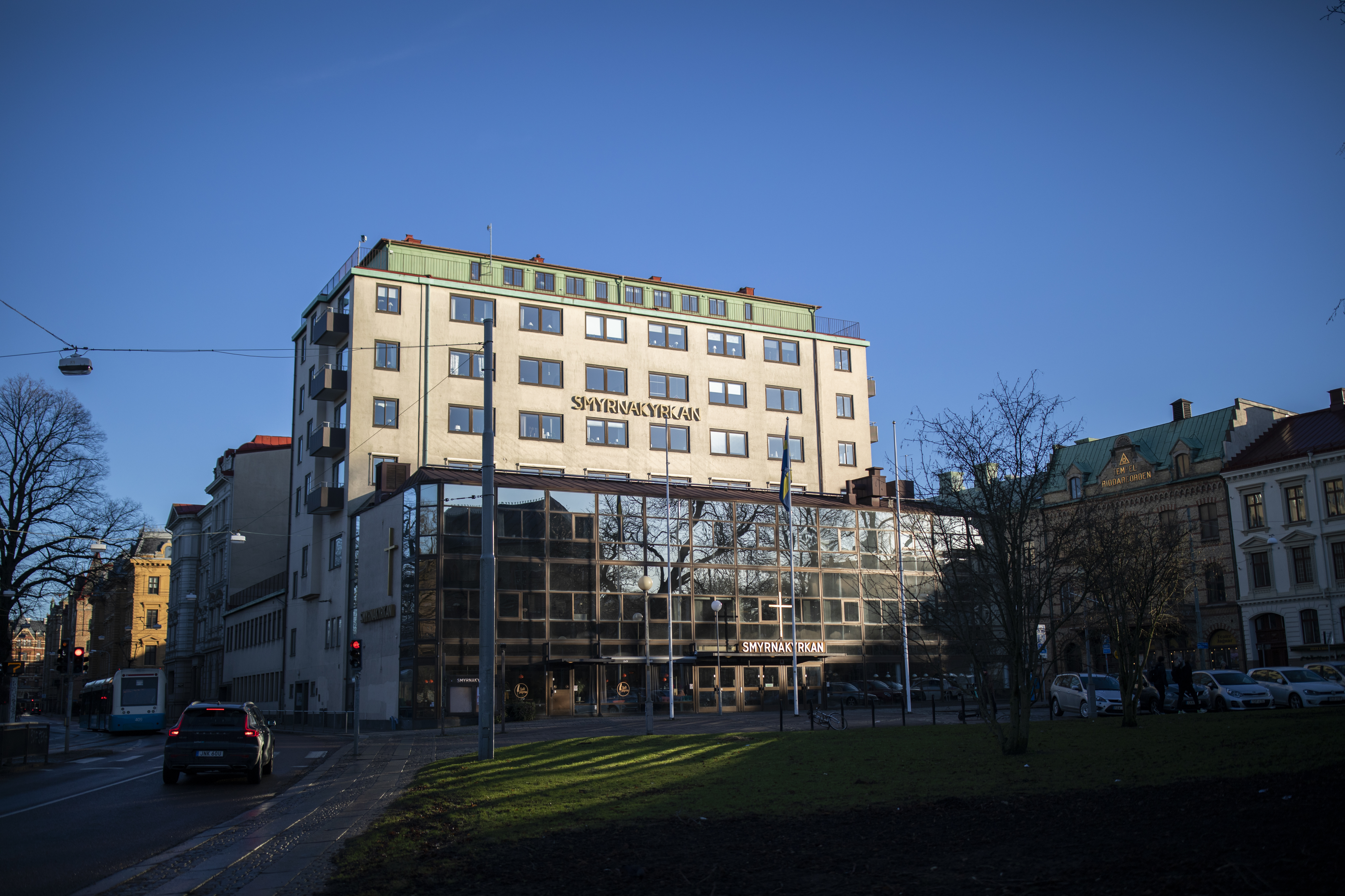 Smyrnakyrkan Januari 2020